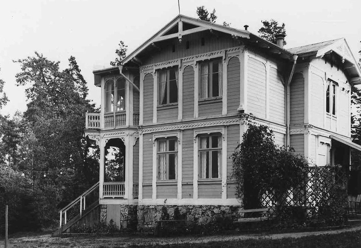 Villa Tusculum i Skärholmen (brann ner i april 1981)